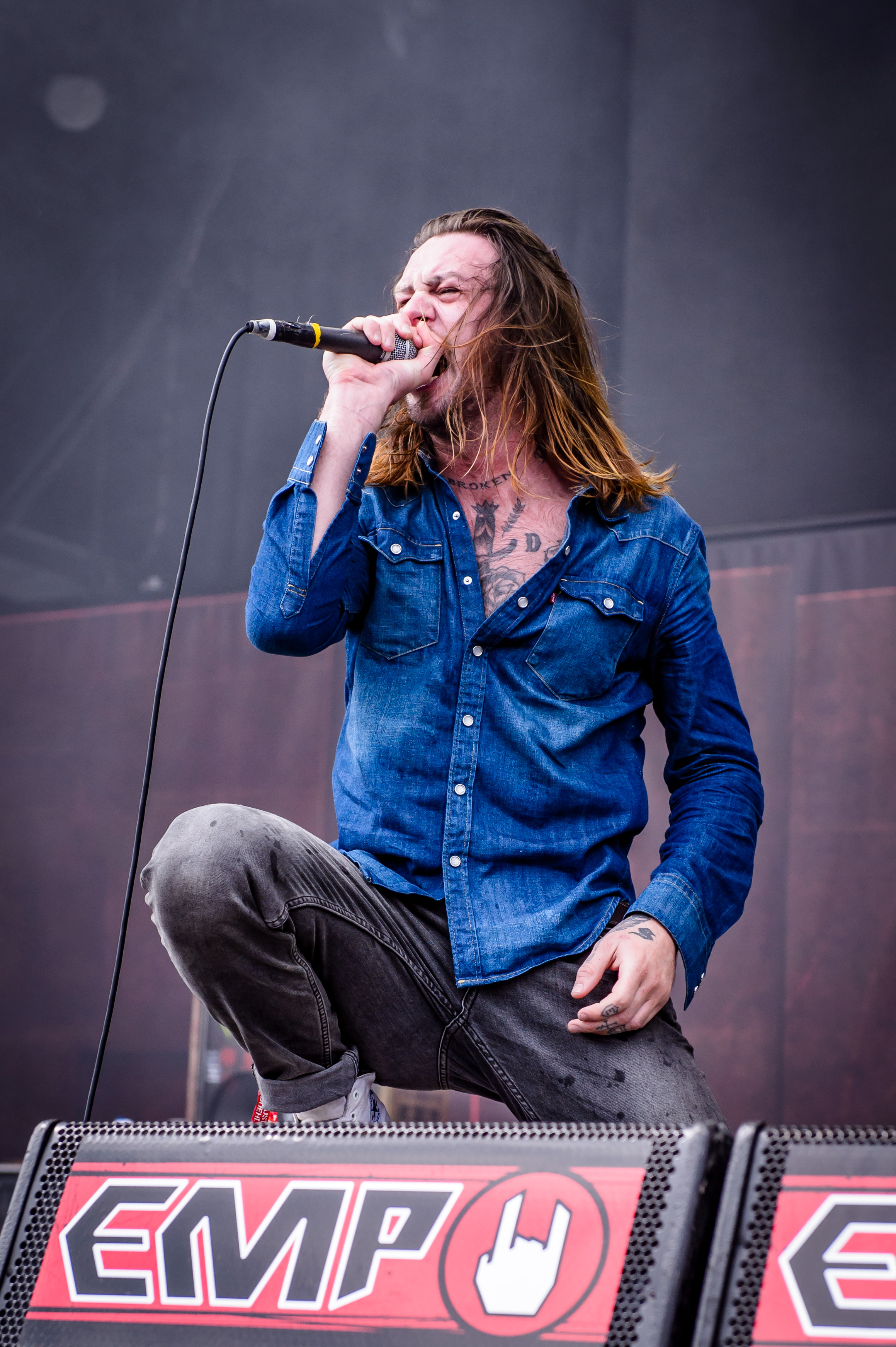 'Summer Breeze Festival 2017; Dinkelsbühl': 'While she sleeps'